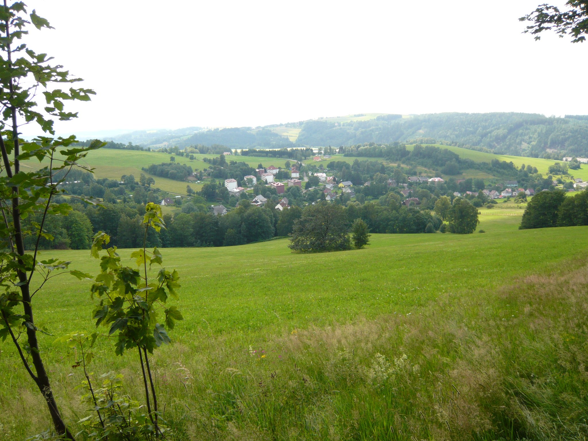 Těchonín